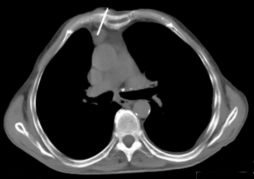 Probeentnahme aus einem Herd im vorderen Mediastinum unter computertomographischer Kontrolle. Die Untersuchung erbrachte ein Thymom. Bei der Wahl des Zugangswegs ist der Verlauf der A. mammaria interna zu beachten.